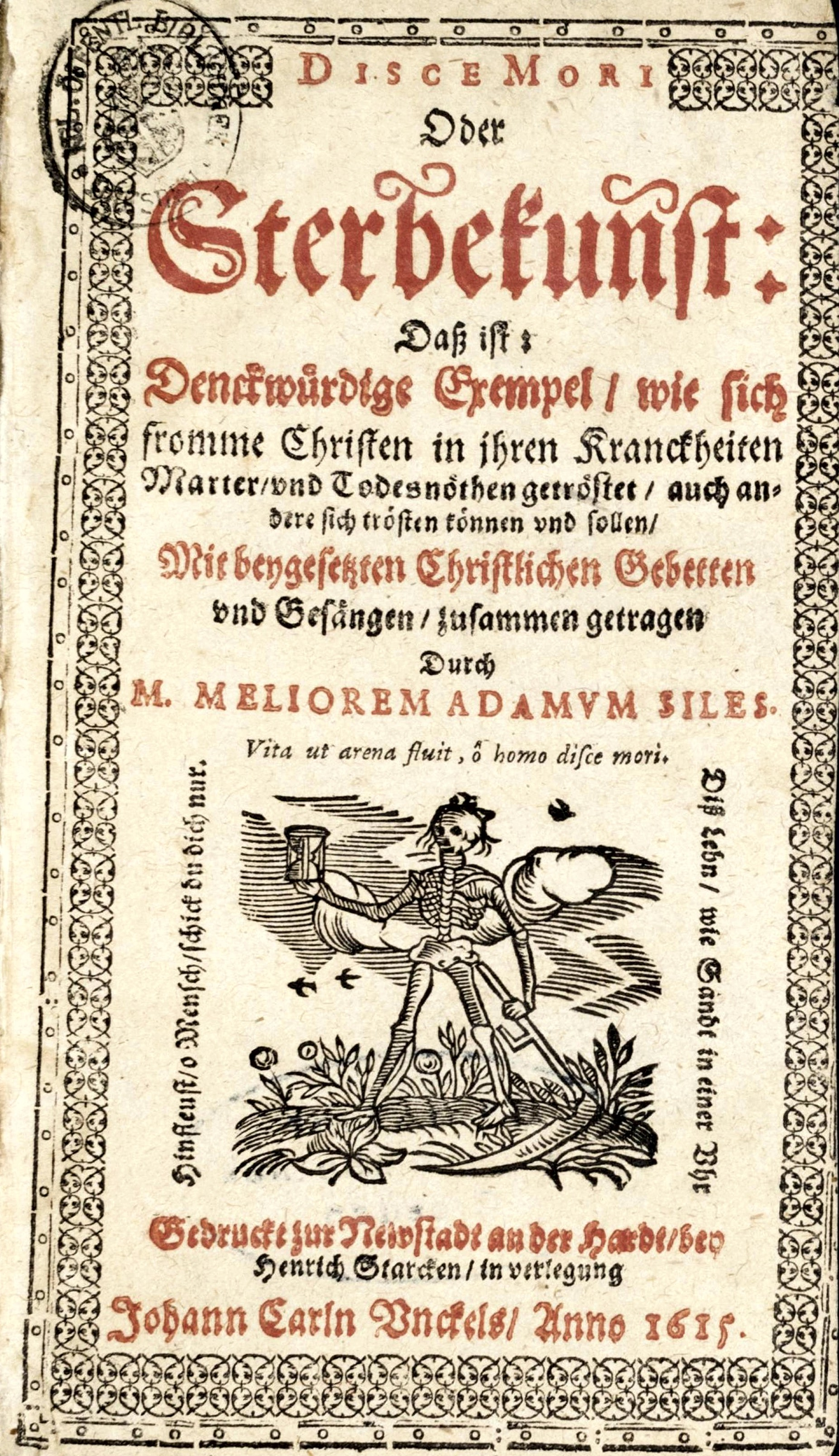 Disce mori, libri Melchioris Adam titulus